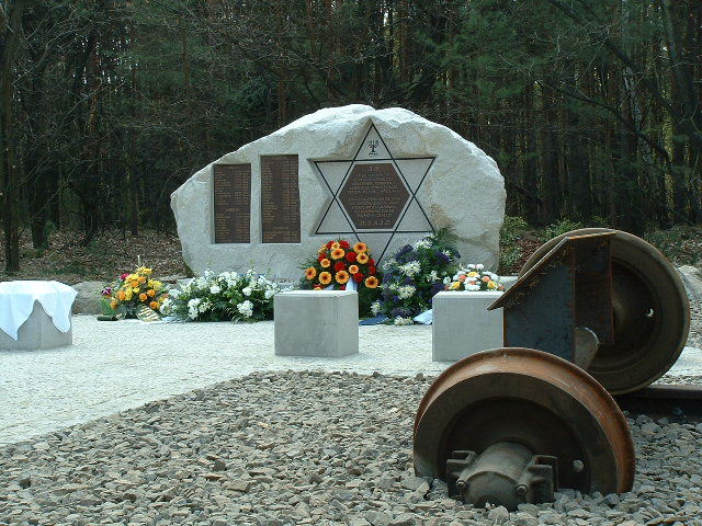 Jüdisches Denkmal